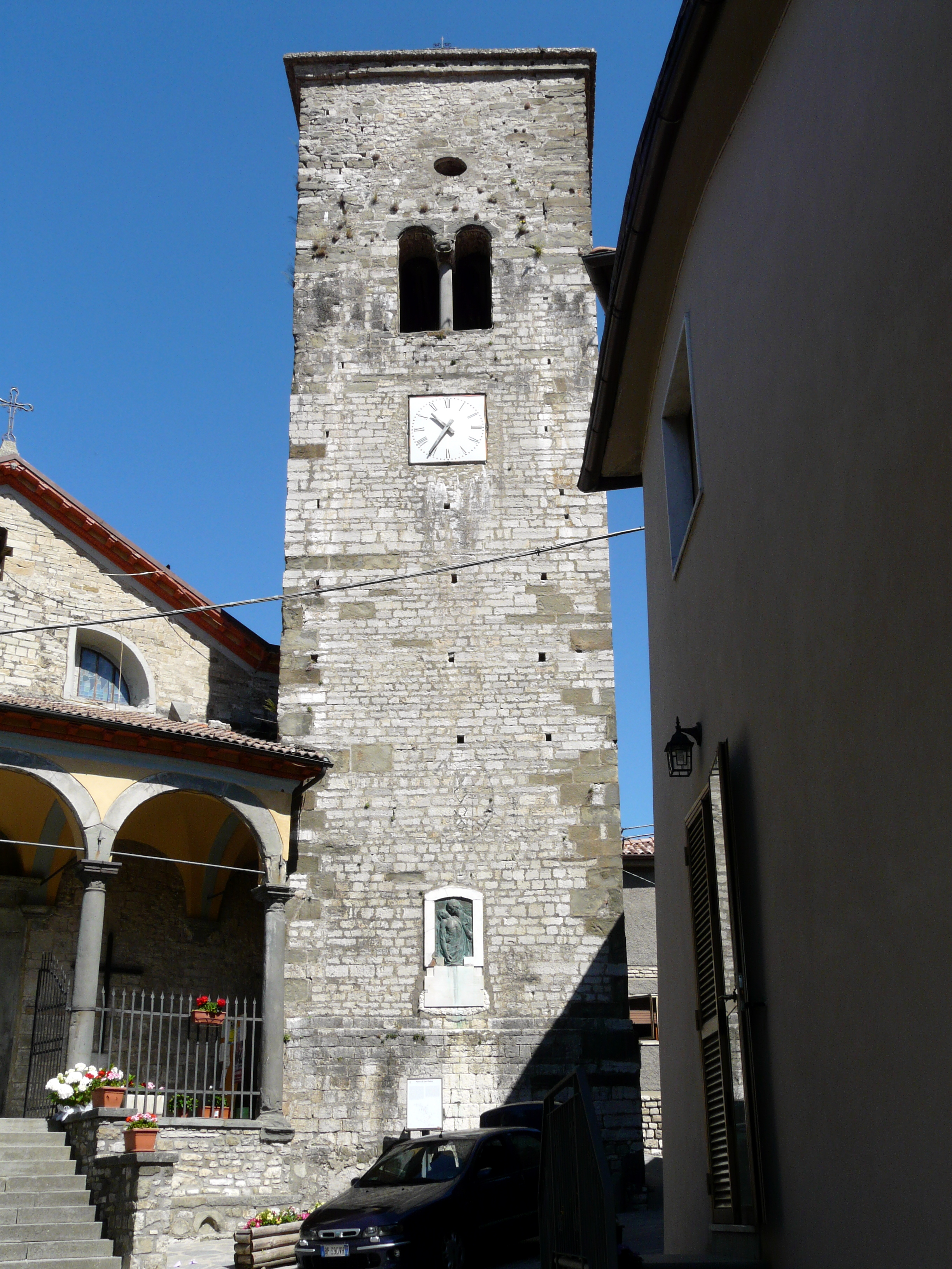 Campanile della pieve di San Pietro Porta, Careggine, Toscana, Italia